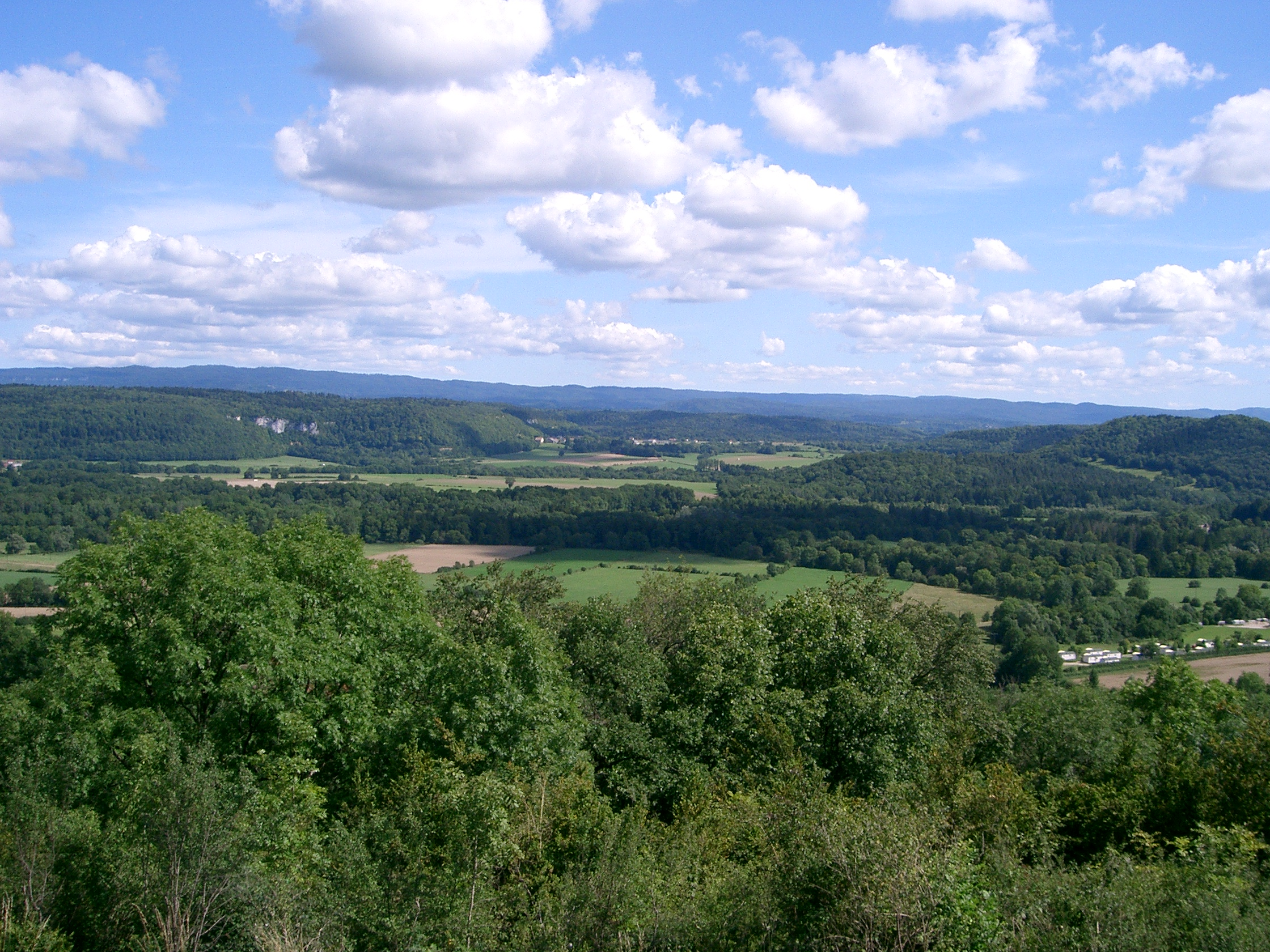 La Combe d'Ain vue depuis le belvédère de Châtillon dans le Jura (France)